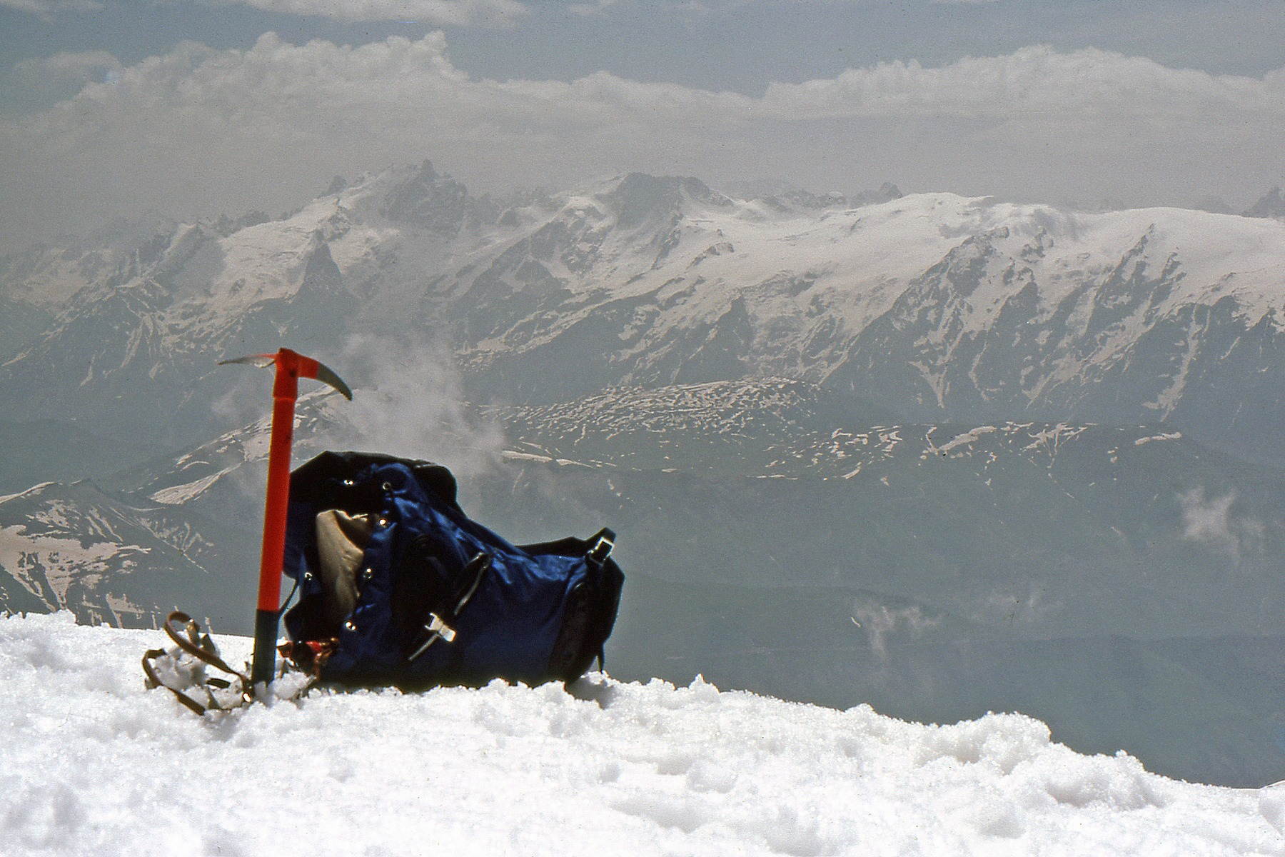 Randonnée au Pic de l'Etendard en juillet 1977. Enneigement sans doute exceptionnel cette année-là. Diapo 37: Au sommet, vue vers la Meije et le Rateau.